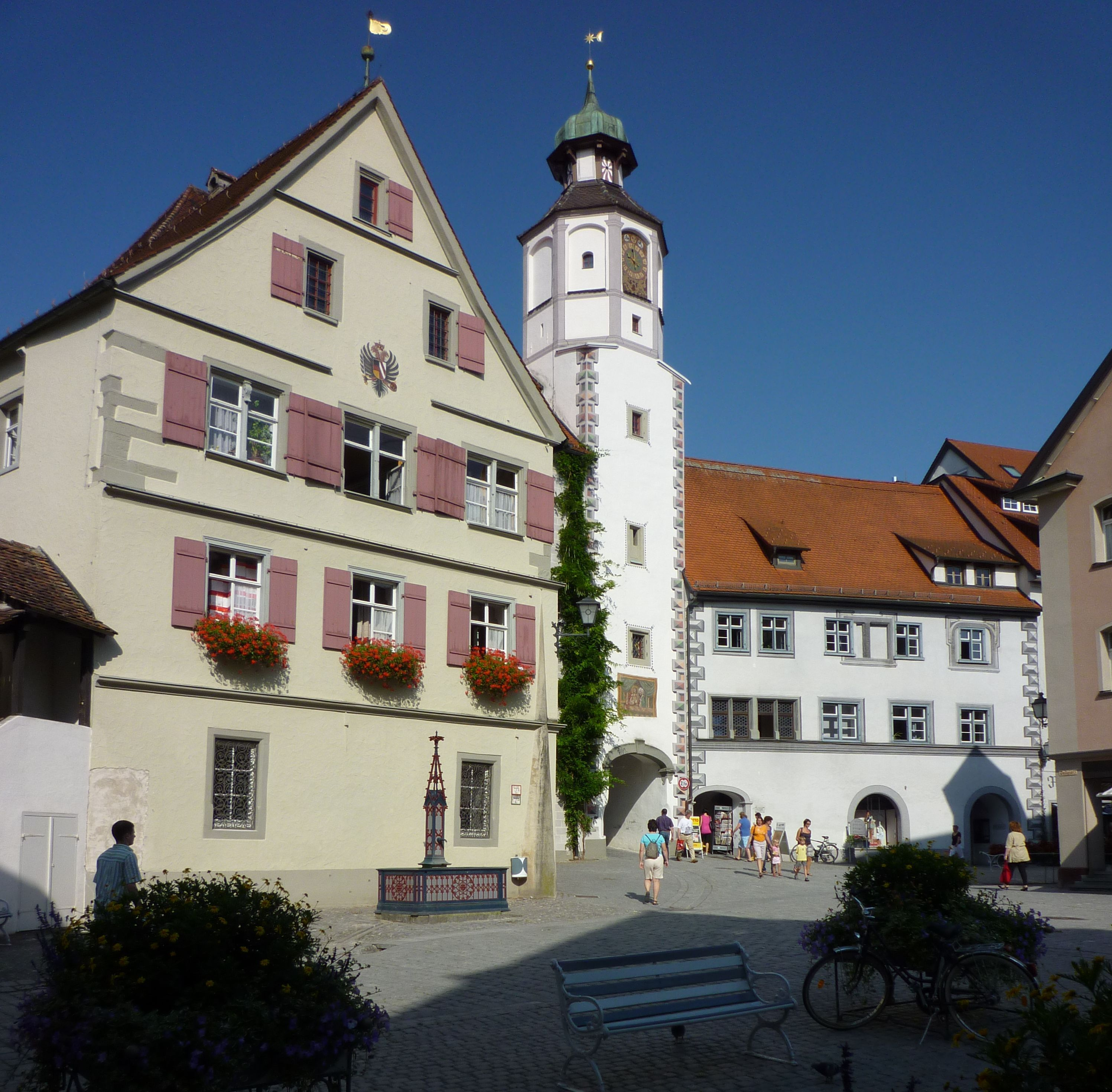 Wangen, Postplatz mit Torturm (Pfaffentor)